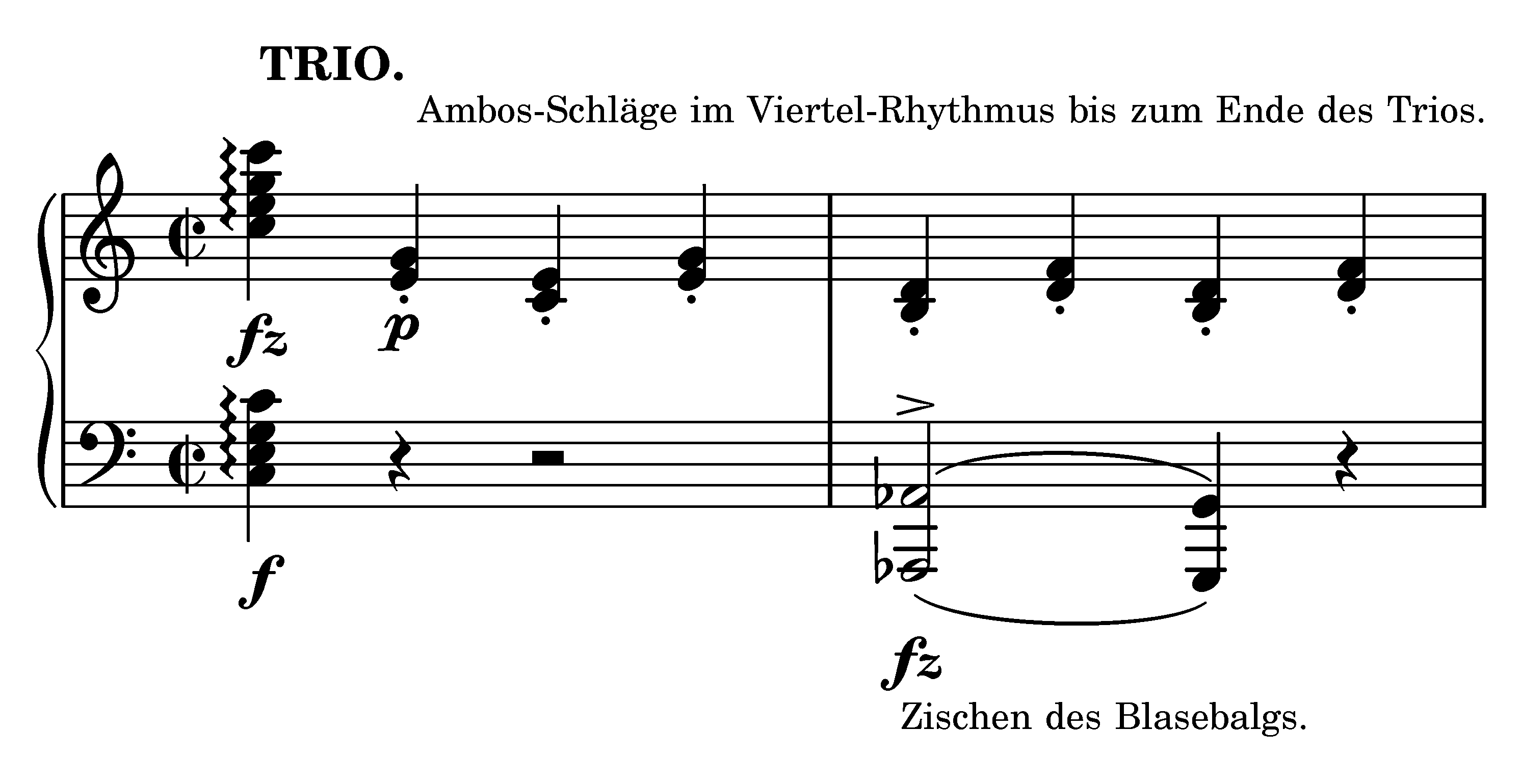 Der kreuzfidele Kupferschmied, Opus 70 Trio, Einleitung